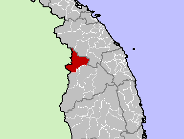 Dak Glei District, Kon Tum Province, Vietnam.